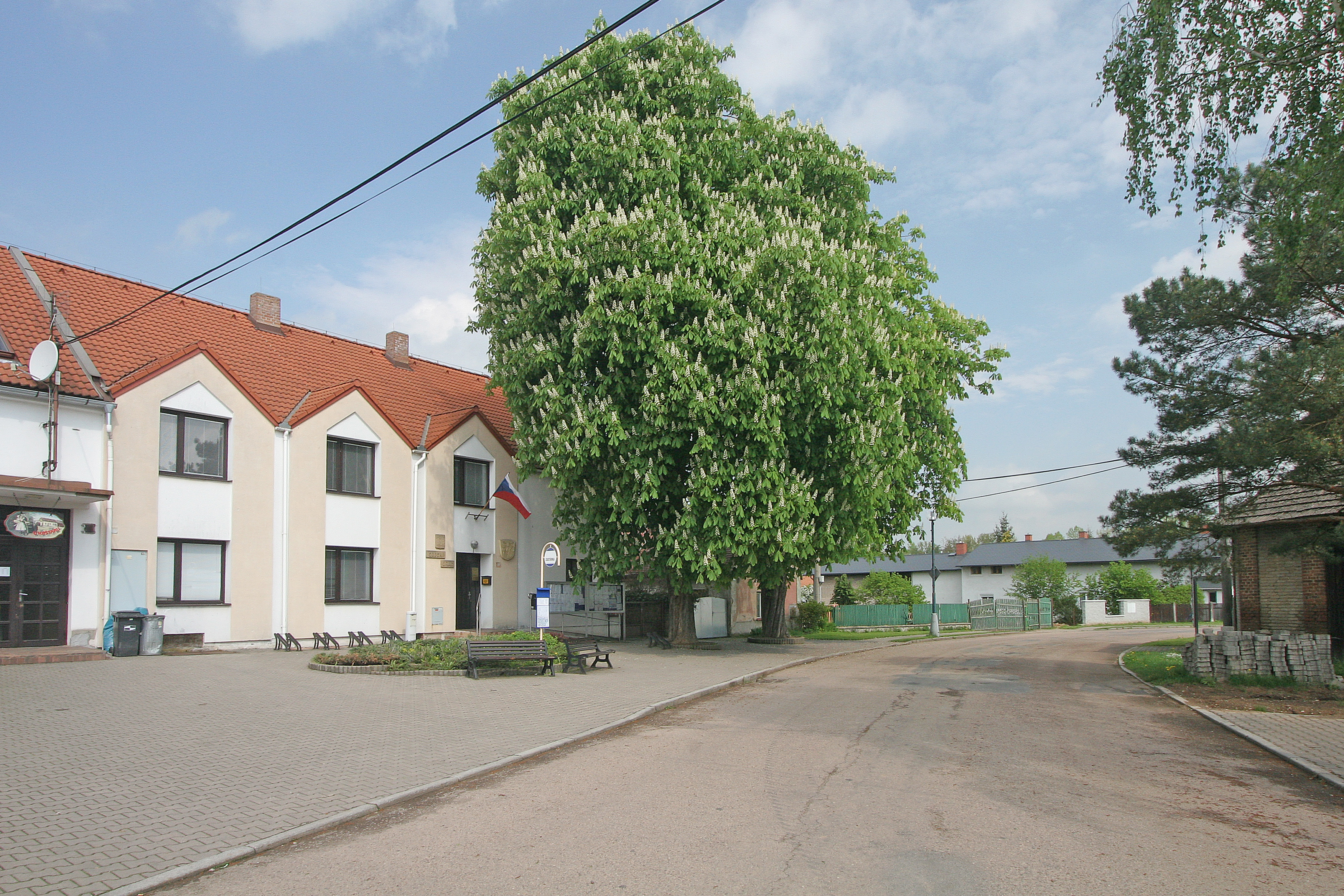 Kratonohy obecní úřad